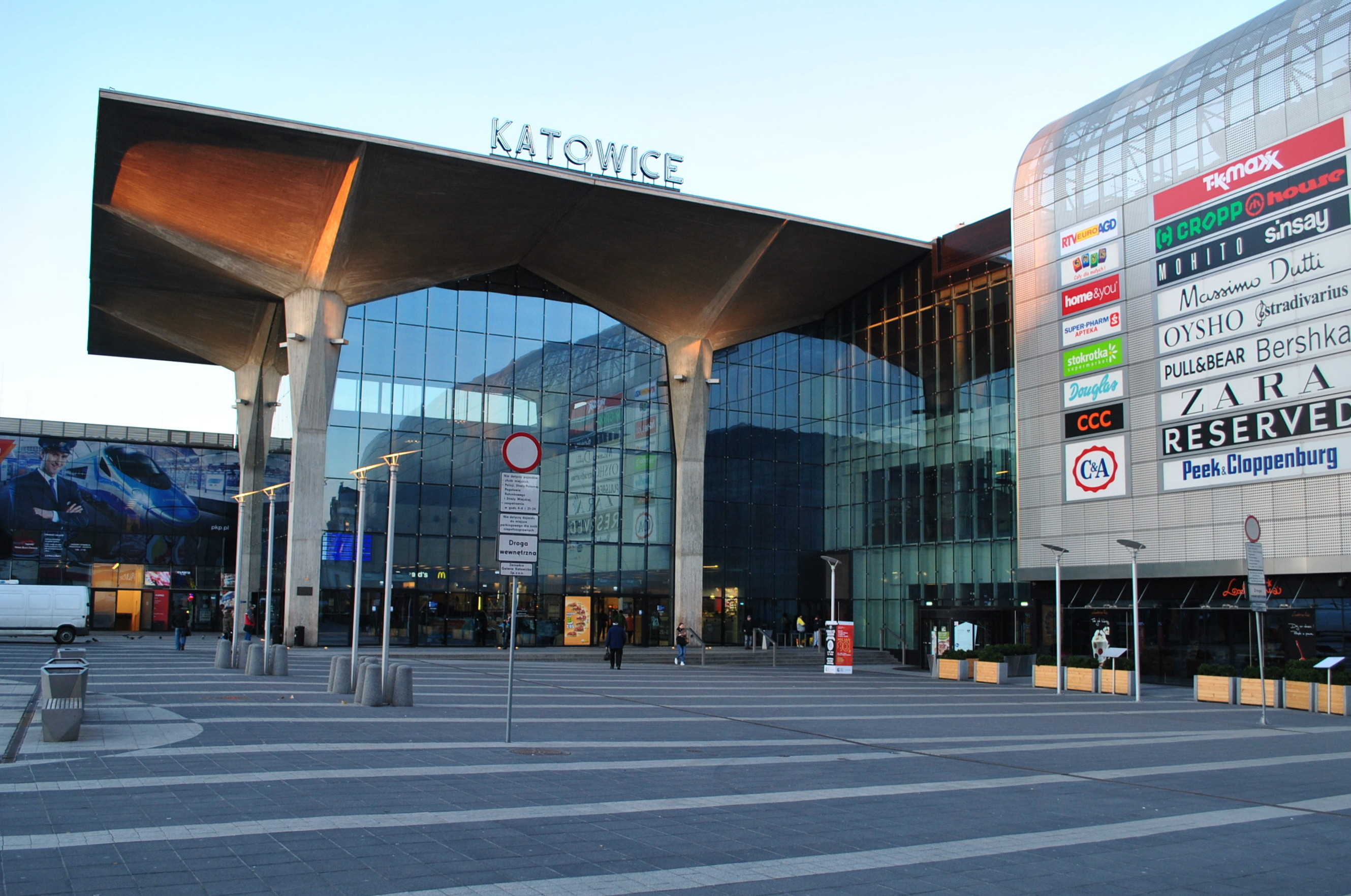 Stacja kolejowa Katowice. Główny budynek dworca